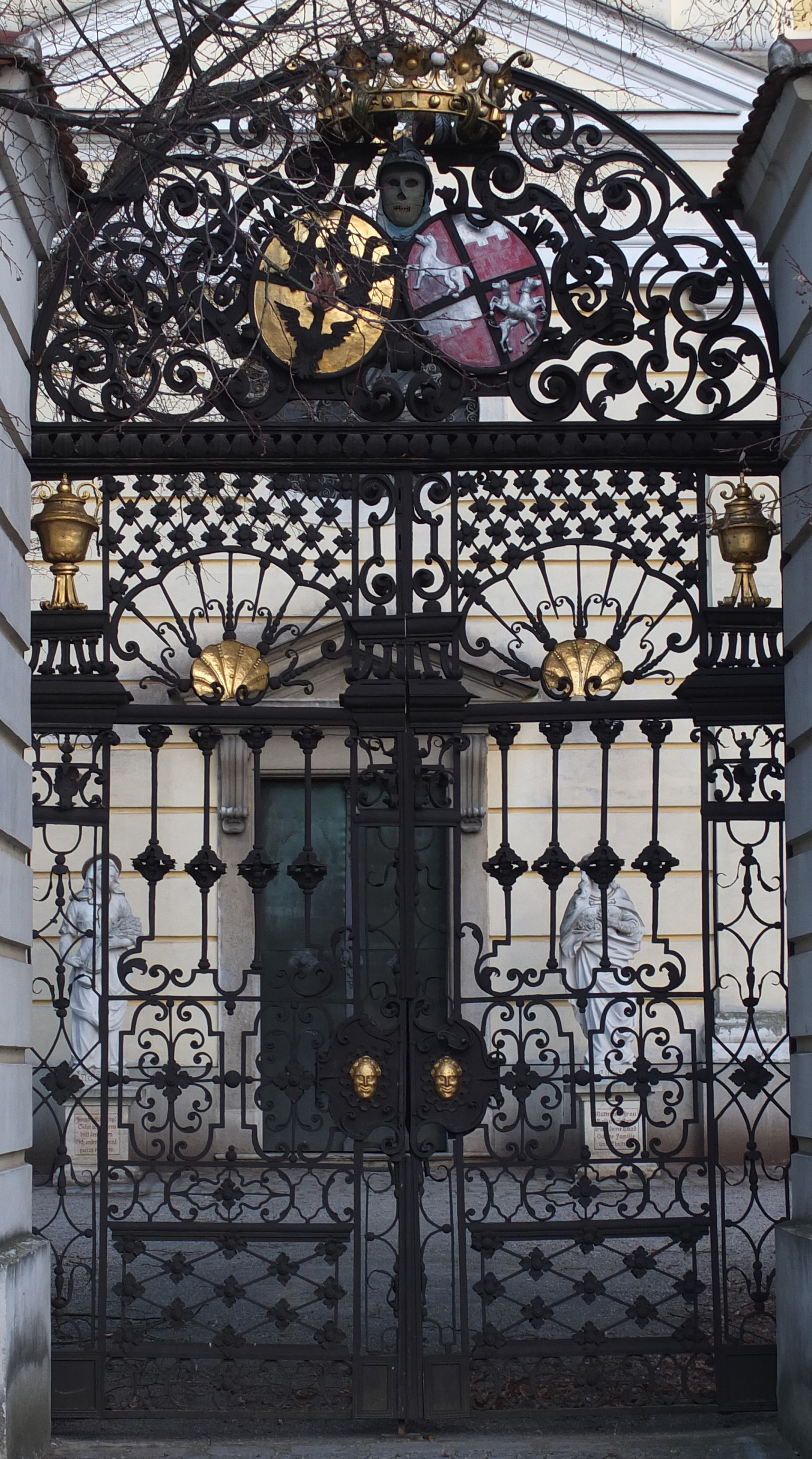 Schmiedeeisernes Tor vor der Kirche in Großweikersdorf, Niederösterreich.